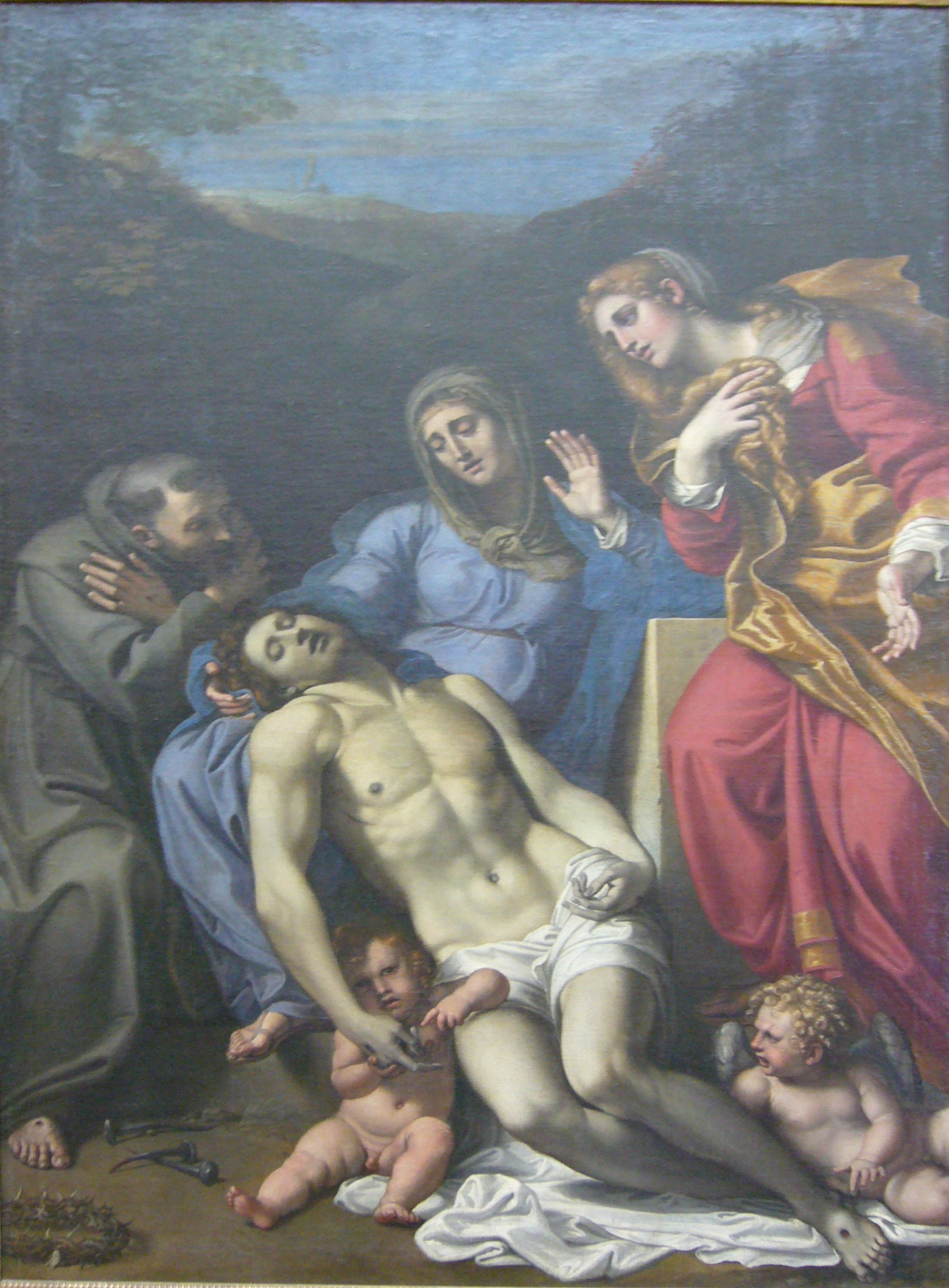 Pietà avec saint François et Marie-Madeleine